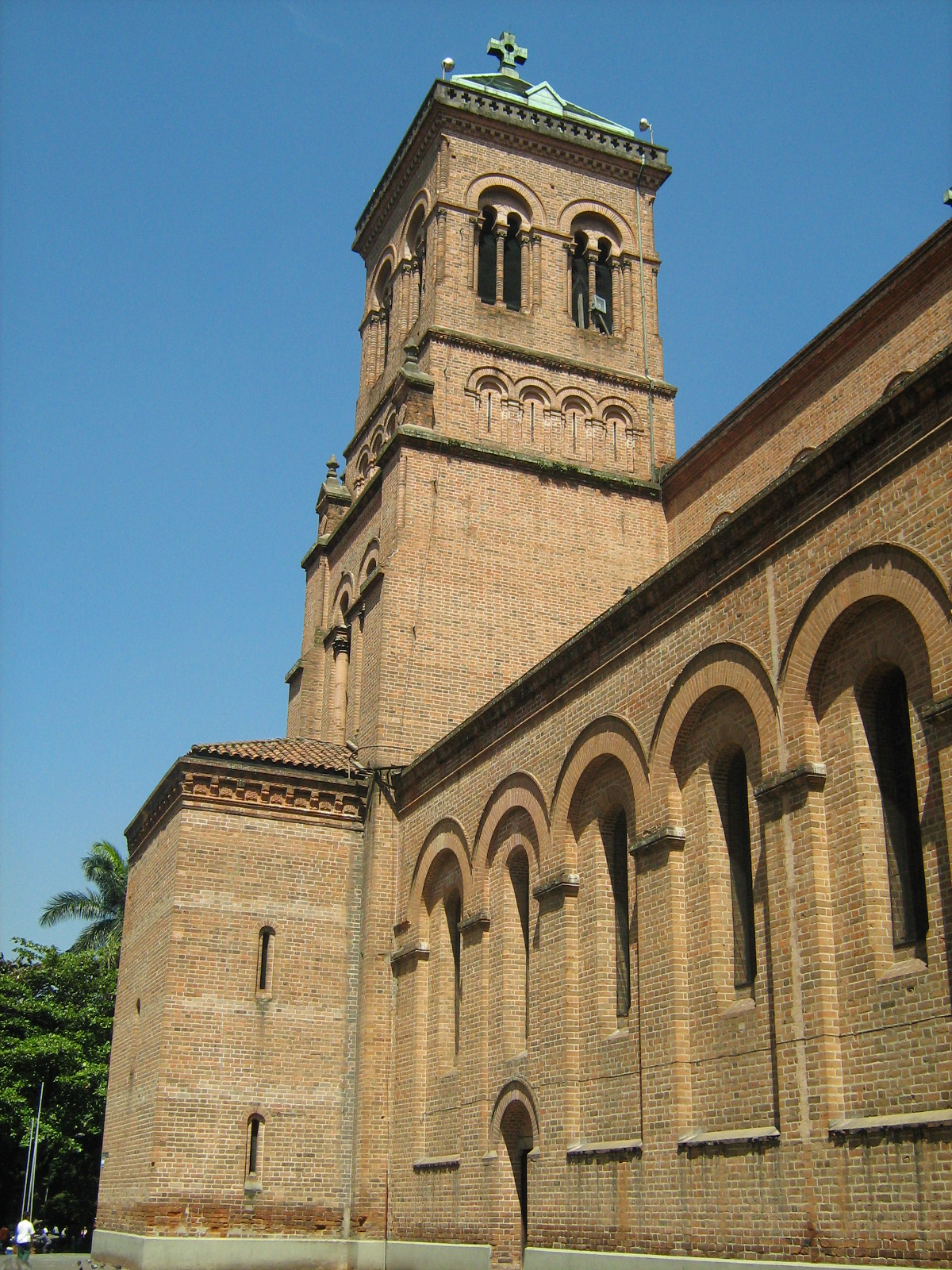 Torre oriental de la Catedral Metropolitana de Medellín. Colombia.